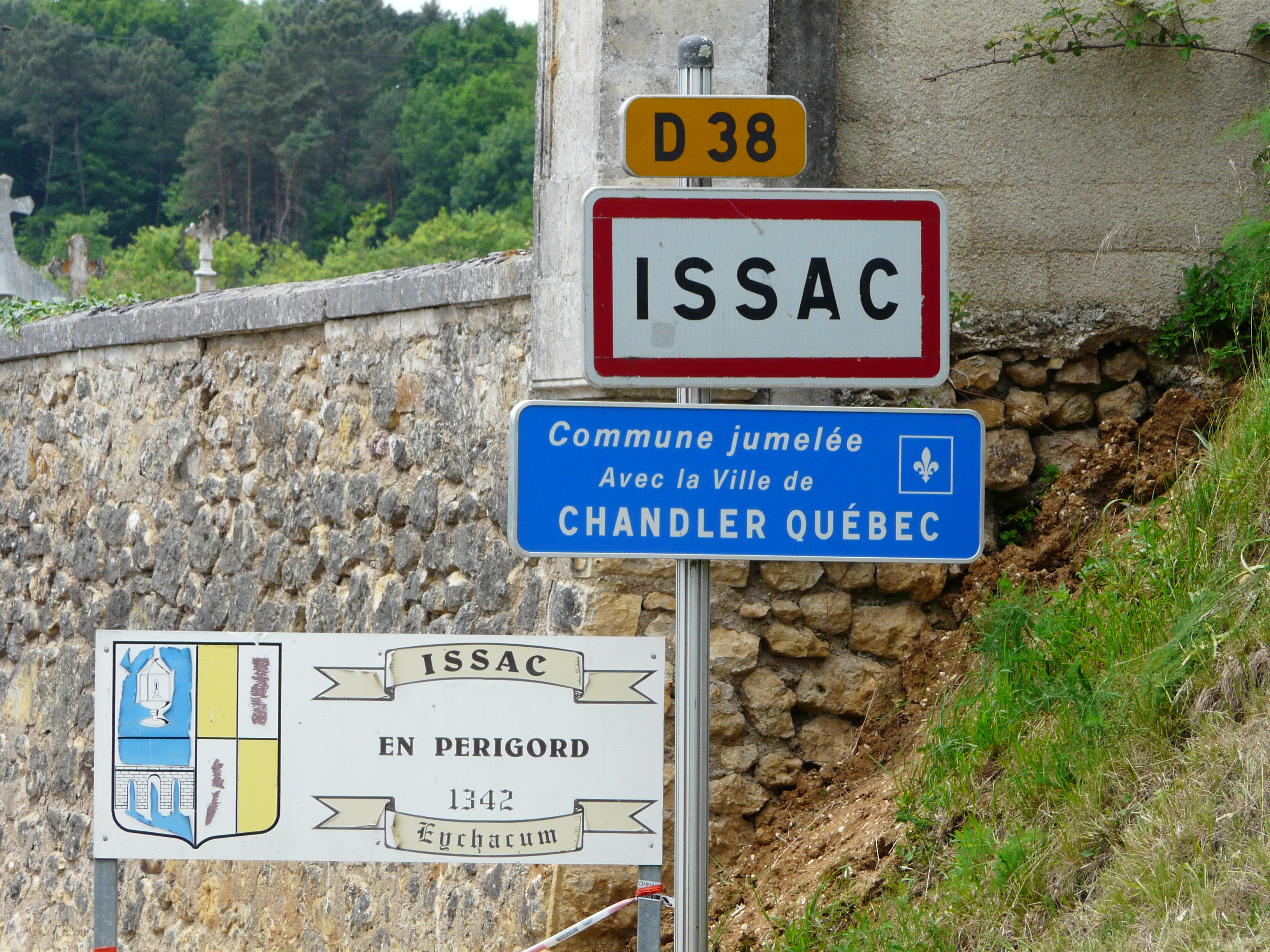 Panneau de jumelage, Bourgnac, Dordogne, France.